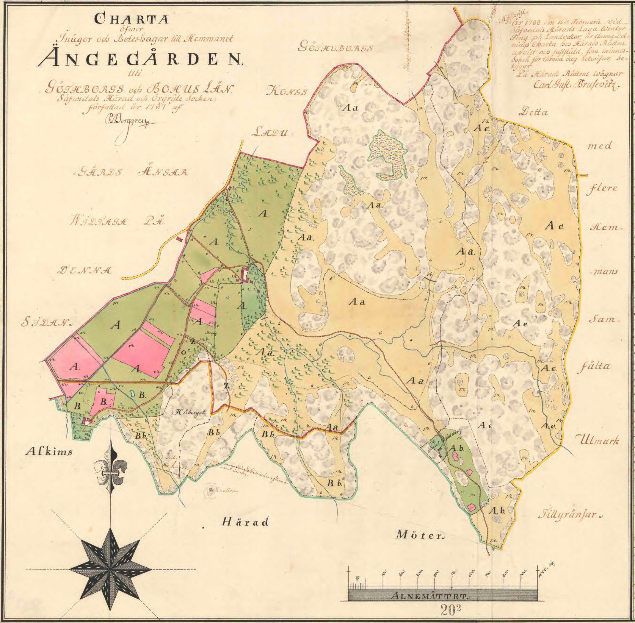 Charta öfwer Inägor och Betes-hagar till Hemmanet Ängegården Uti Göthborgs och Bohuslän, Säfwedals Härad och Örgryte Socken; författad år 1787 af P.Berggren